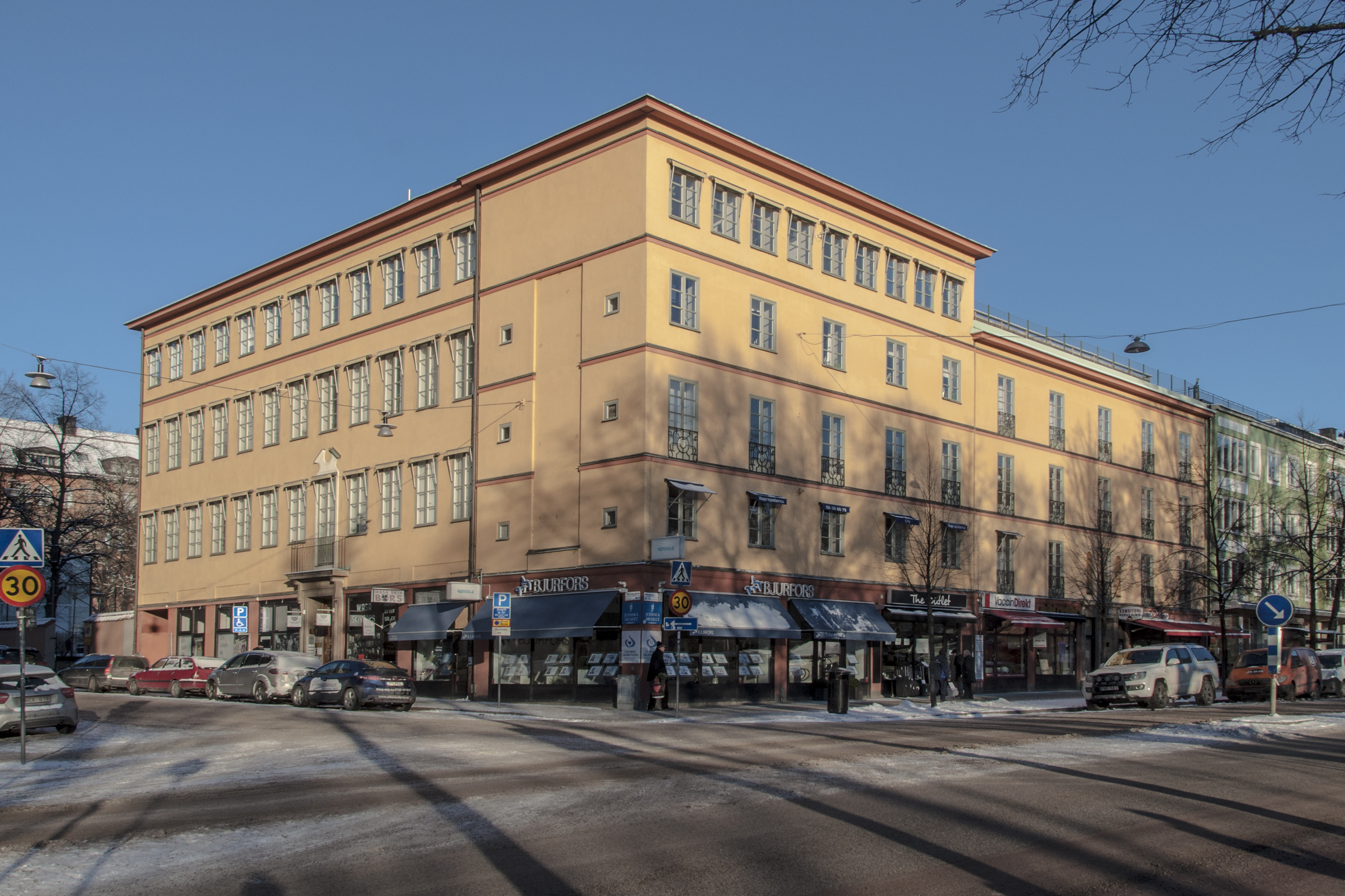 Resedan 5, Hälsingegatan 2, Odengatan 80, Nybyggnadsår 1929 - 1931 som Vasa högre flickskola, Upphovsman Axel Ax:n Lindqvist (Byggherre) L. E. Hellstedt AB (Byggmästare) Ragnar Östberg (Arkitekt)